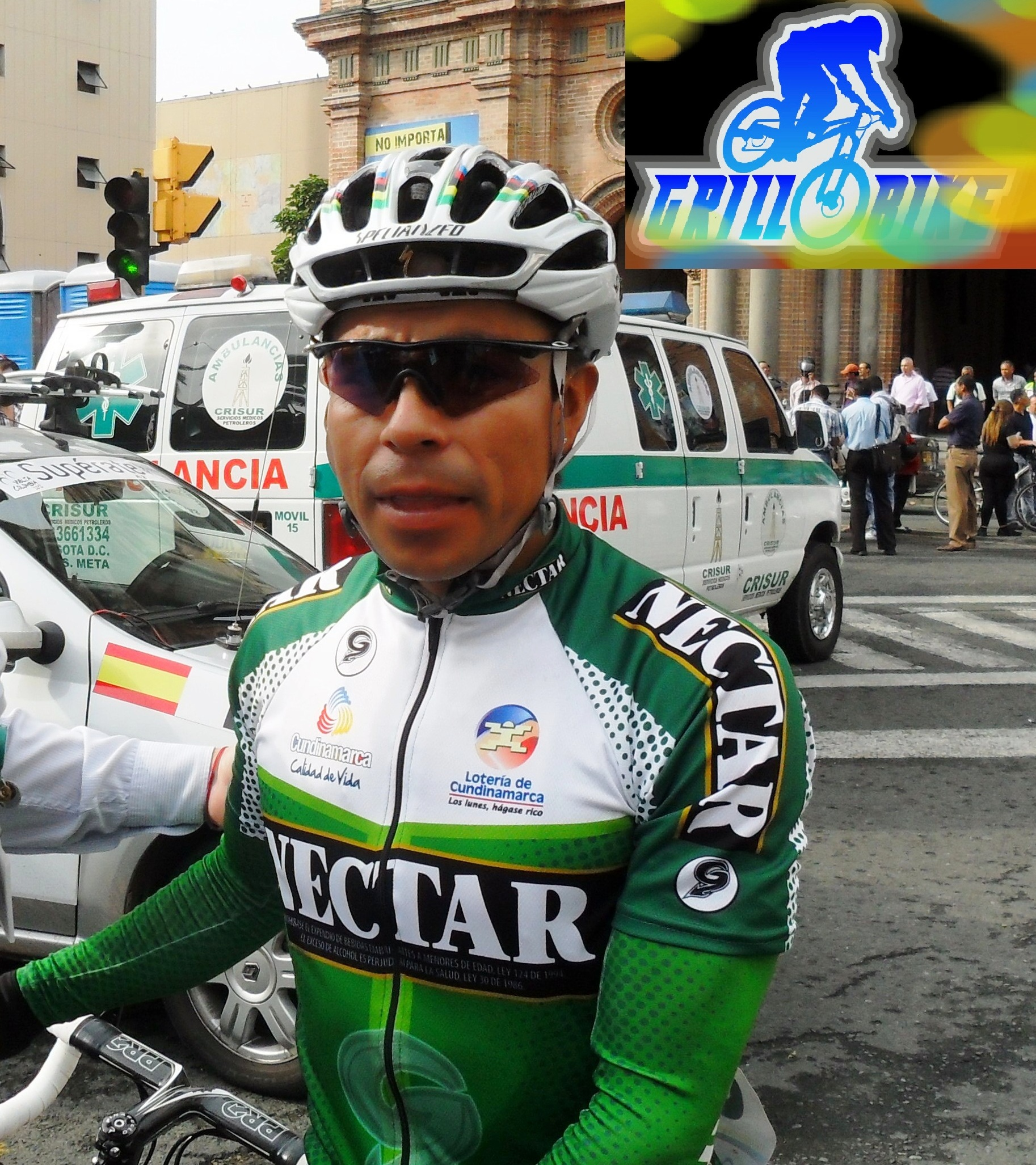 Jose flober peña 4 victorias del Tour de Guadalupe